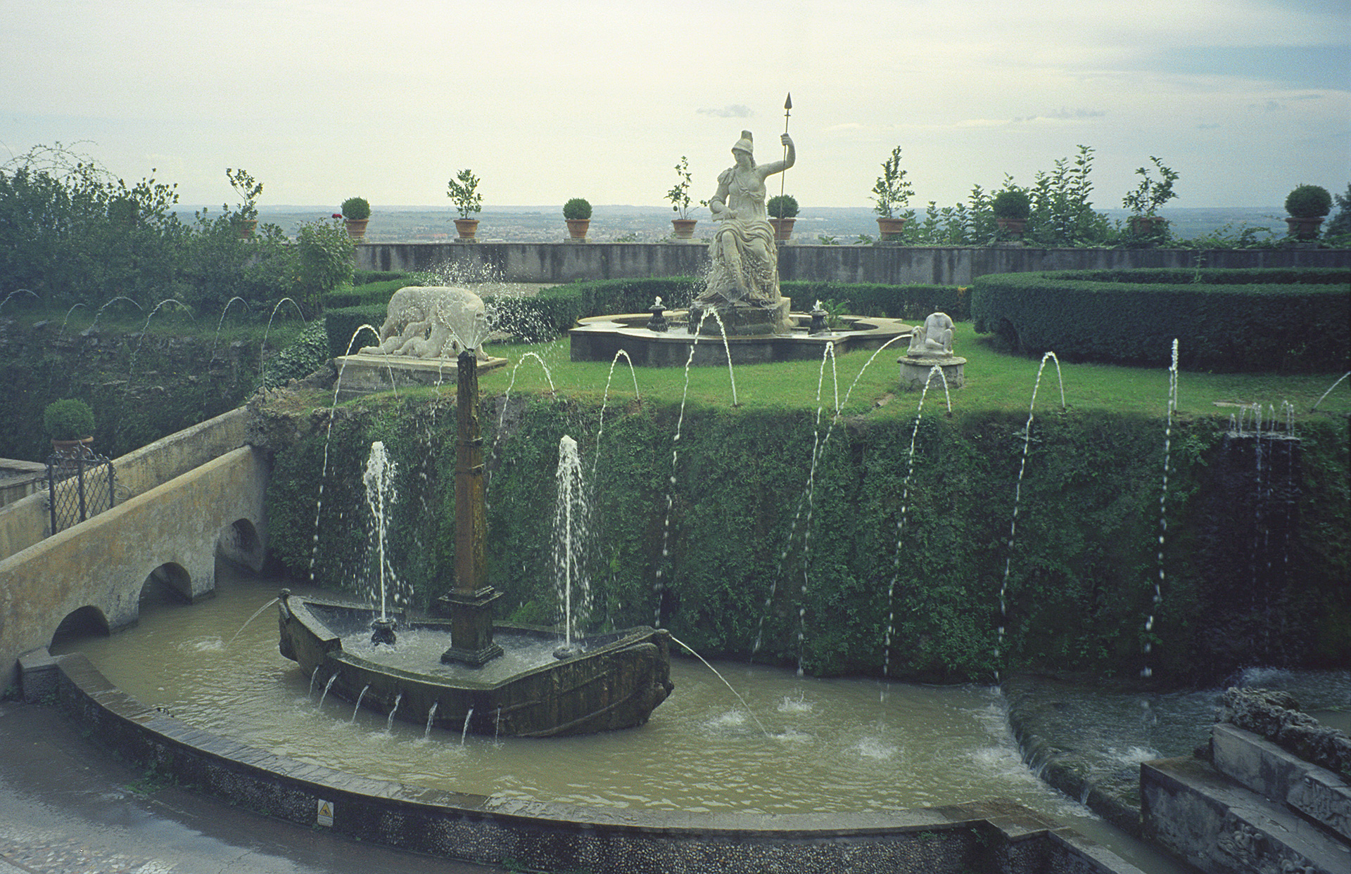 Villa d'Este, Tivoli